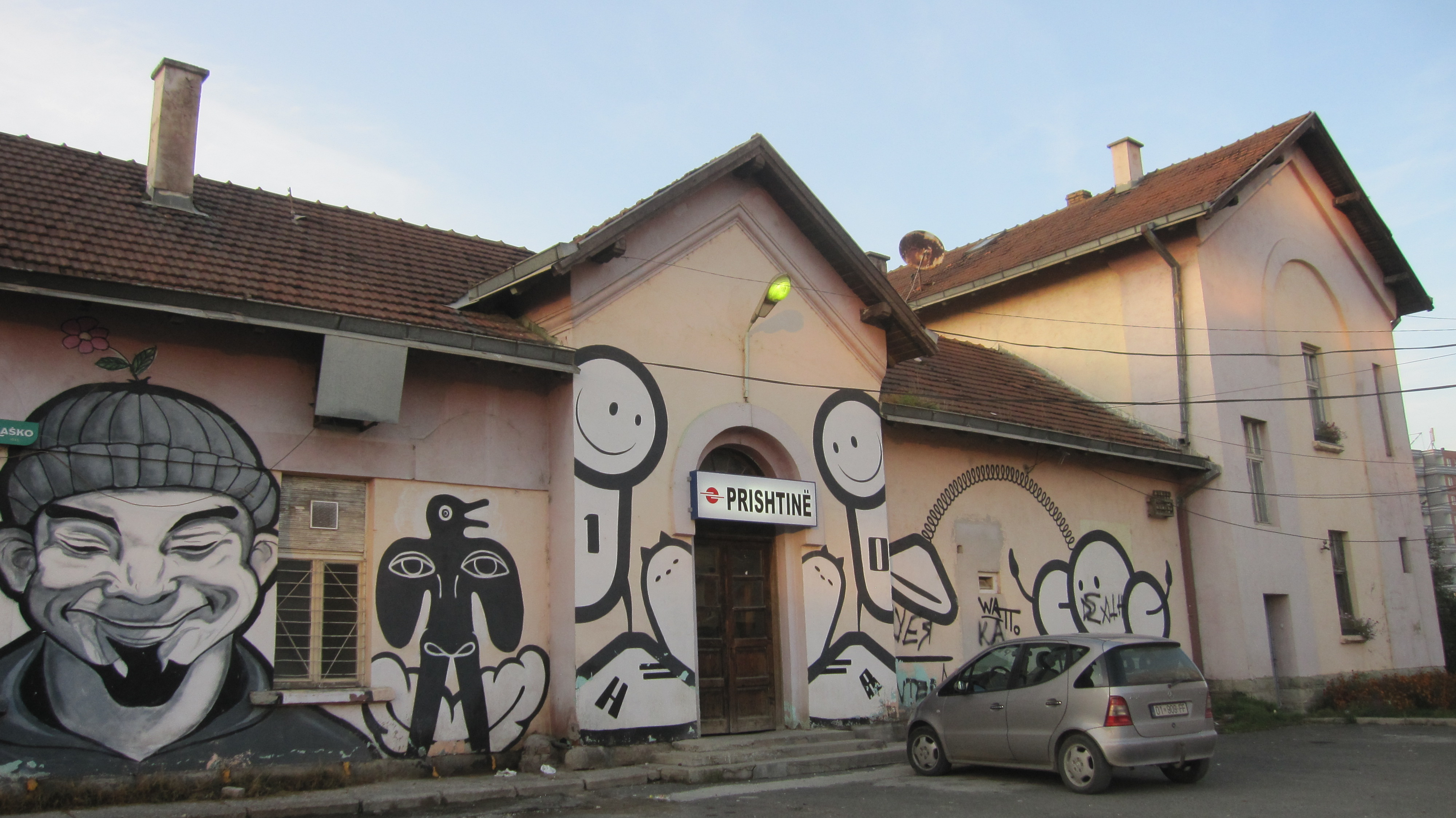 Stacioni I trenit